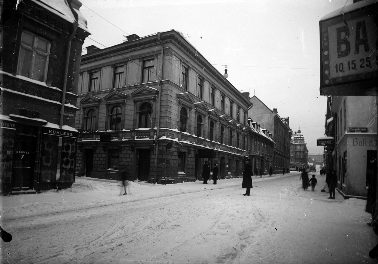 Upsala Ångqvarn AB:s byggnad på Vaksalagatan 5, kvarteret Lejonet, Uppsala 1917. Uppsala, Sweden 1917. Flickr data on 2011-08-24: Tags: Uppsala, Uppland, Sweden License: CC BY 2.0 User: Upplandsmuseet Upplandsmuseet Länsmuseum för Uppsala län